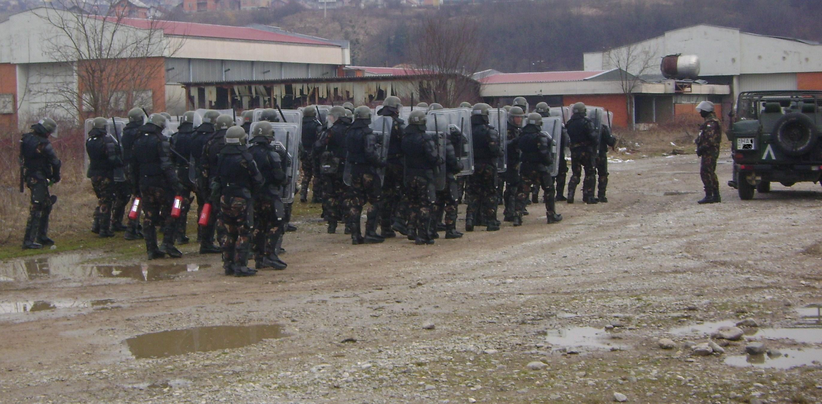 Hungarian Crowd and Riot Control (CRC)